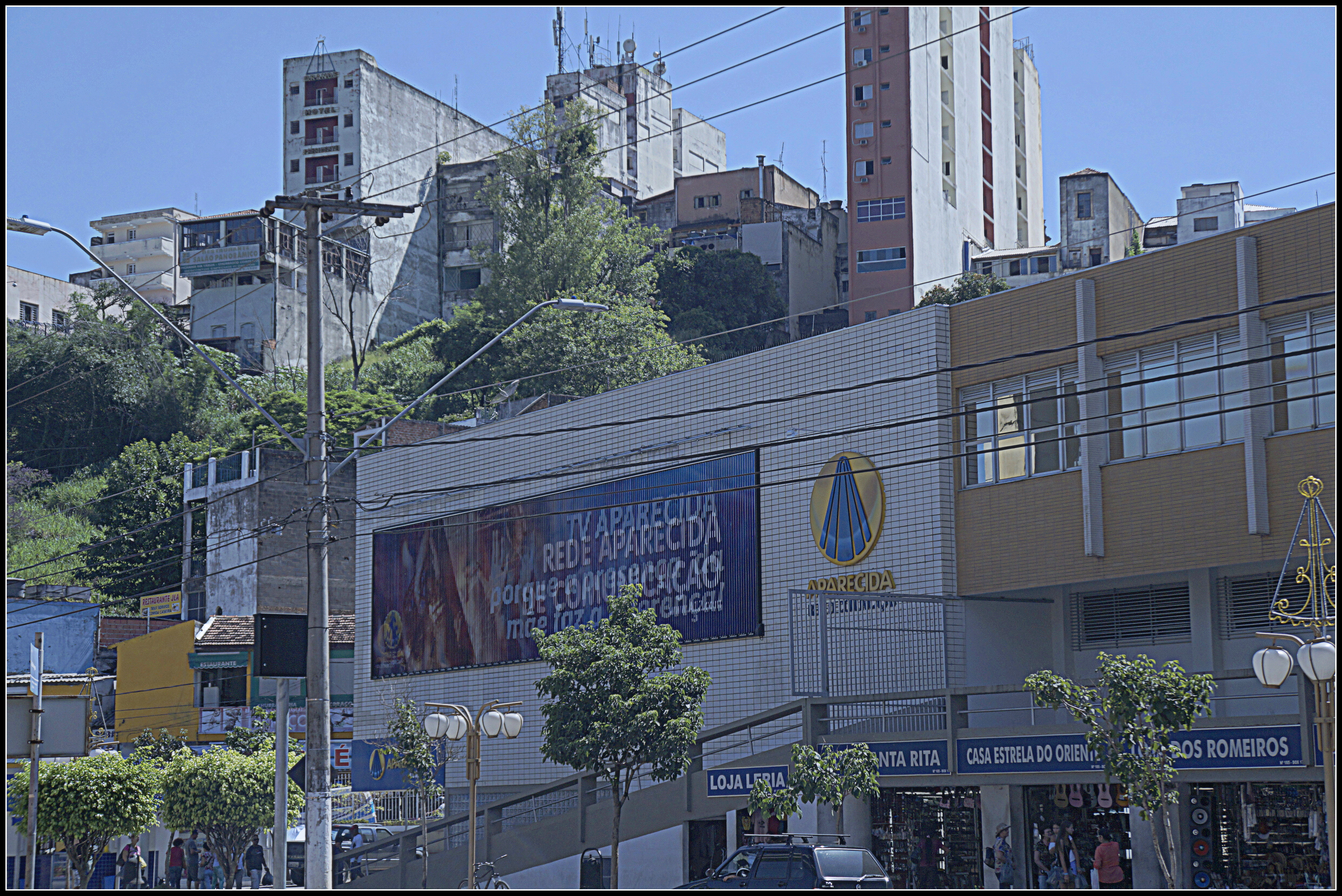 TV Aparecida